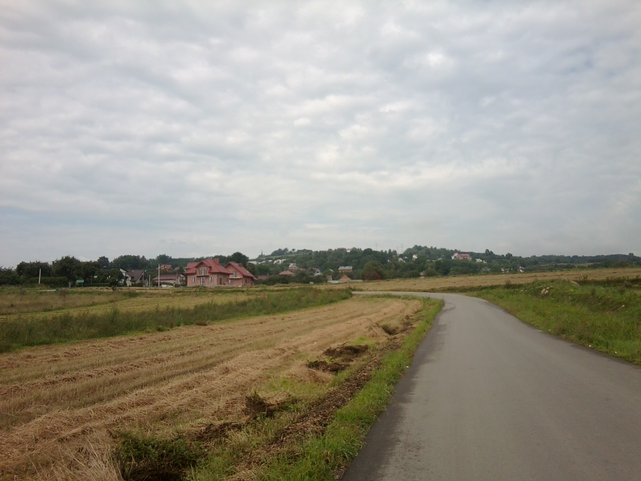 Panorama Chochorowic